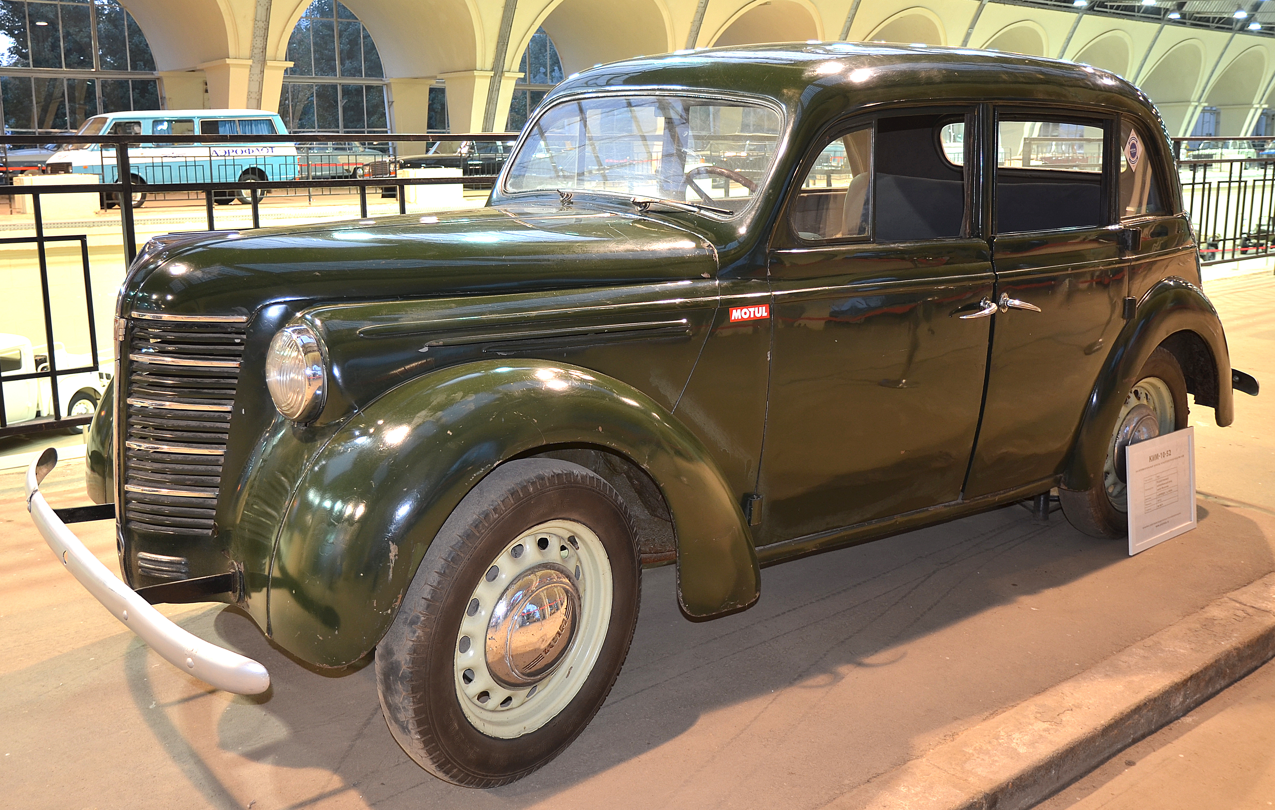 Можно увидеть здесь : You can see here